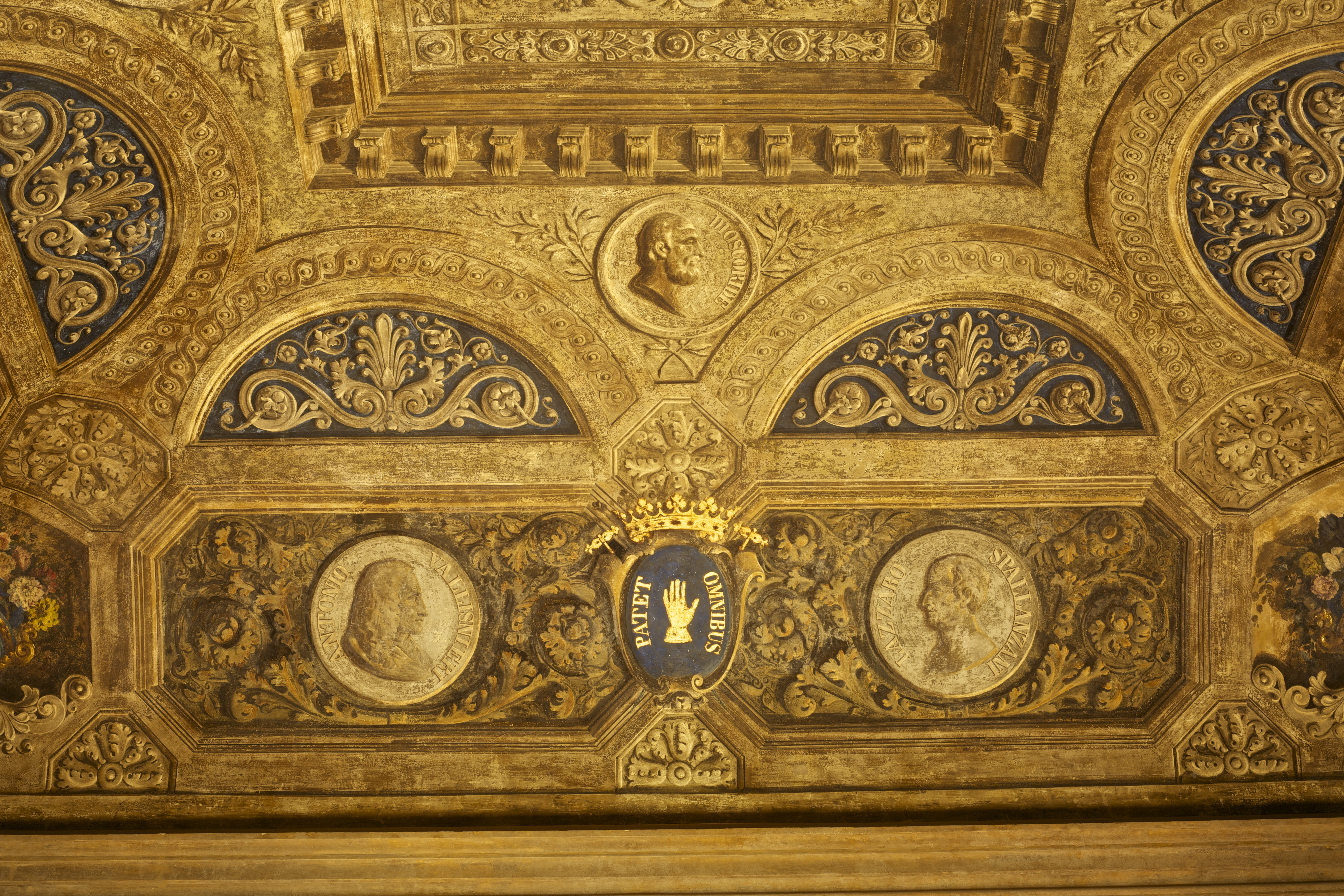 dettagli volta affrescata della farmacia storica dell'ospedale Sant'Agostino di Modena